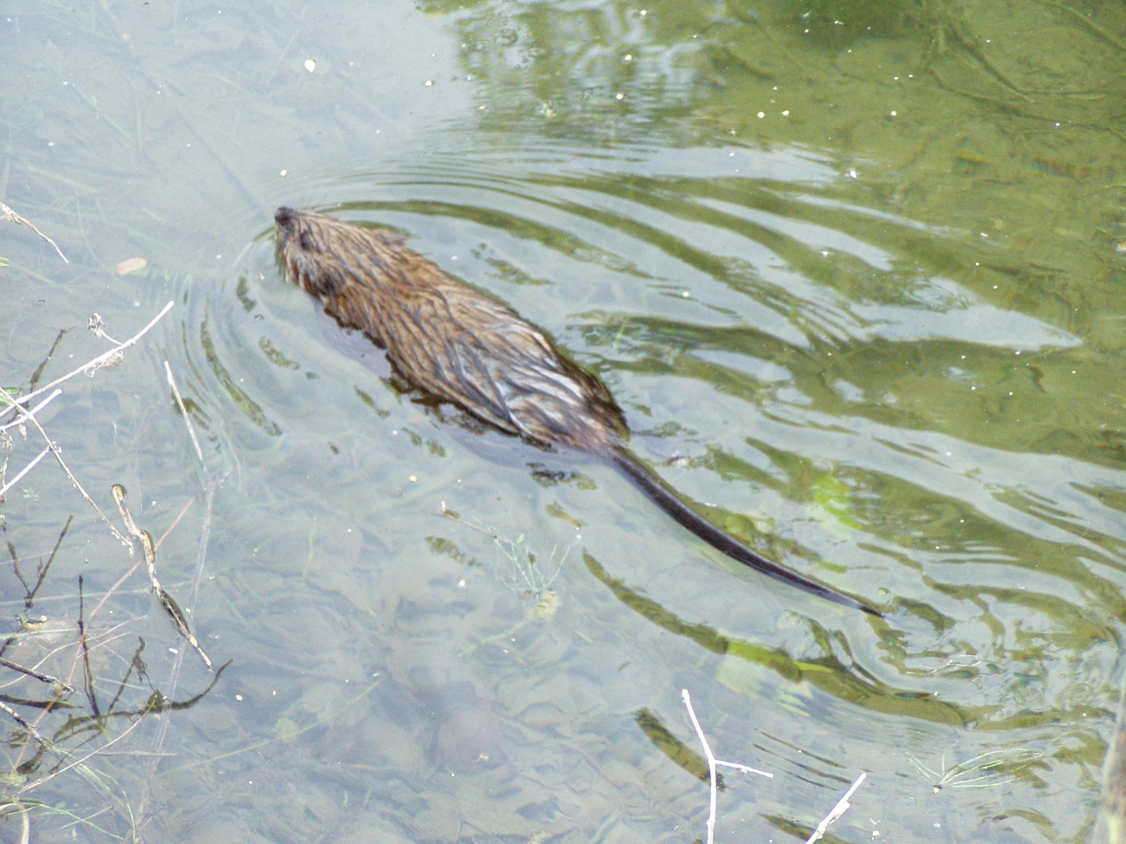 A muskrat swimming